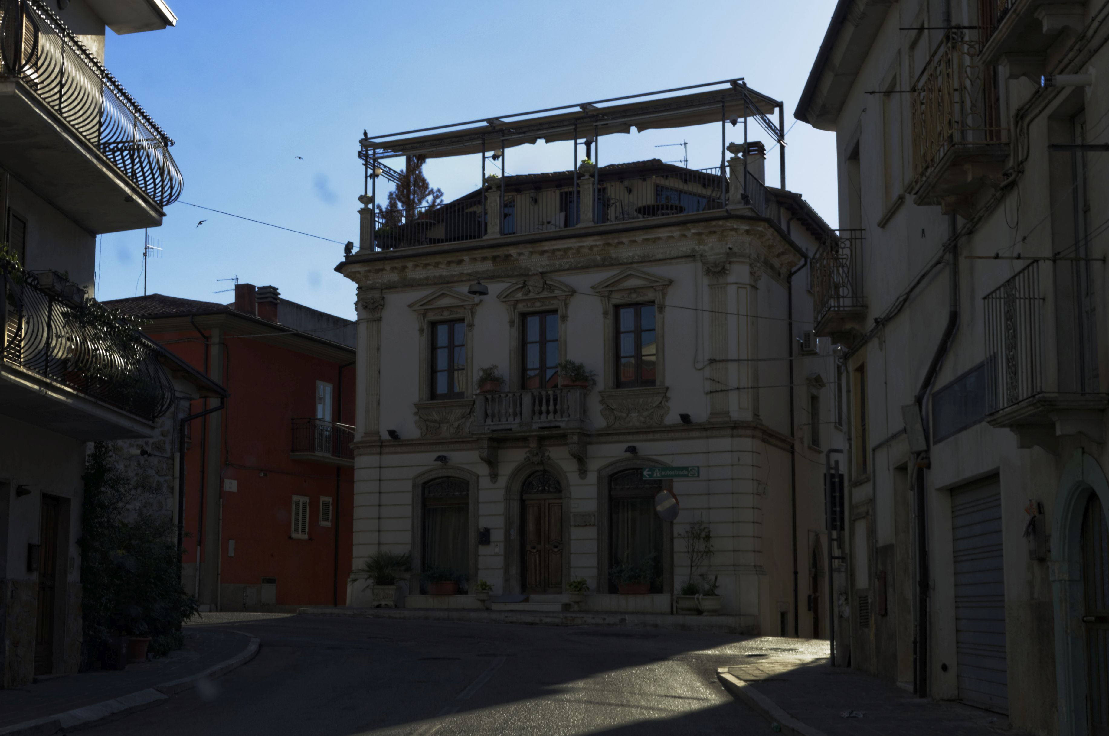 Pratola Peligna - 2017